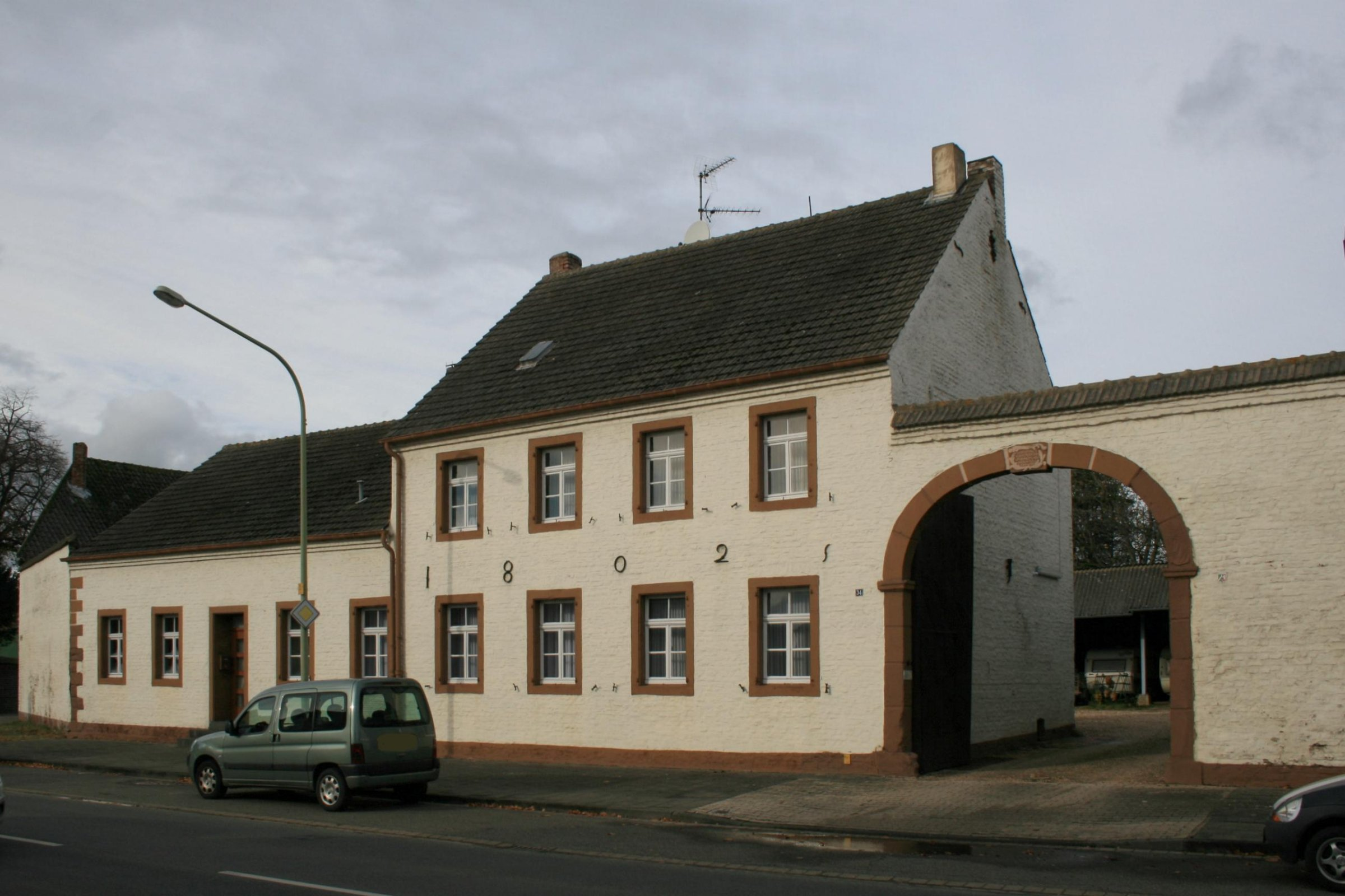 Bauernhof Heribertstr. 34 in Nörvenich-Eschweiler ü.F.